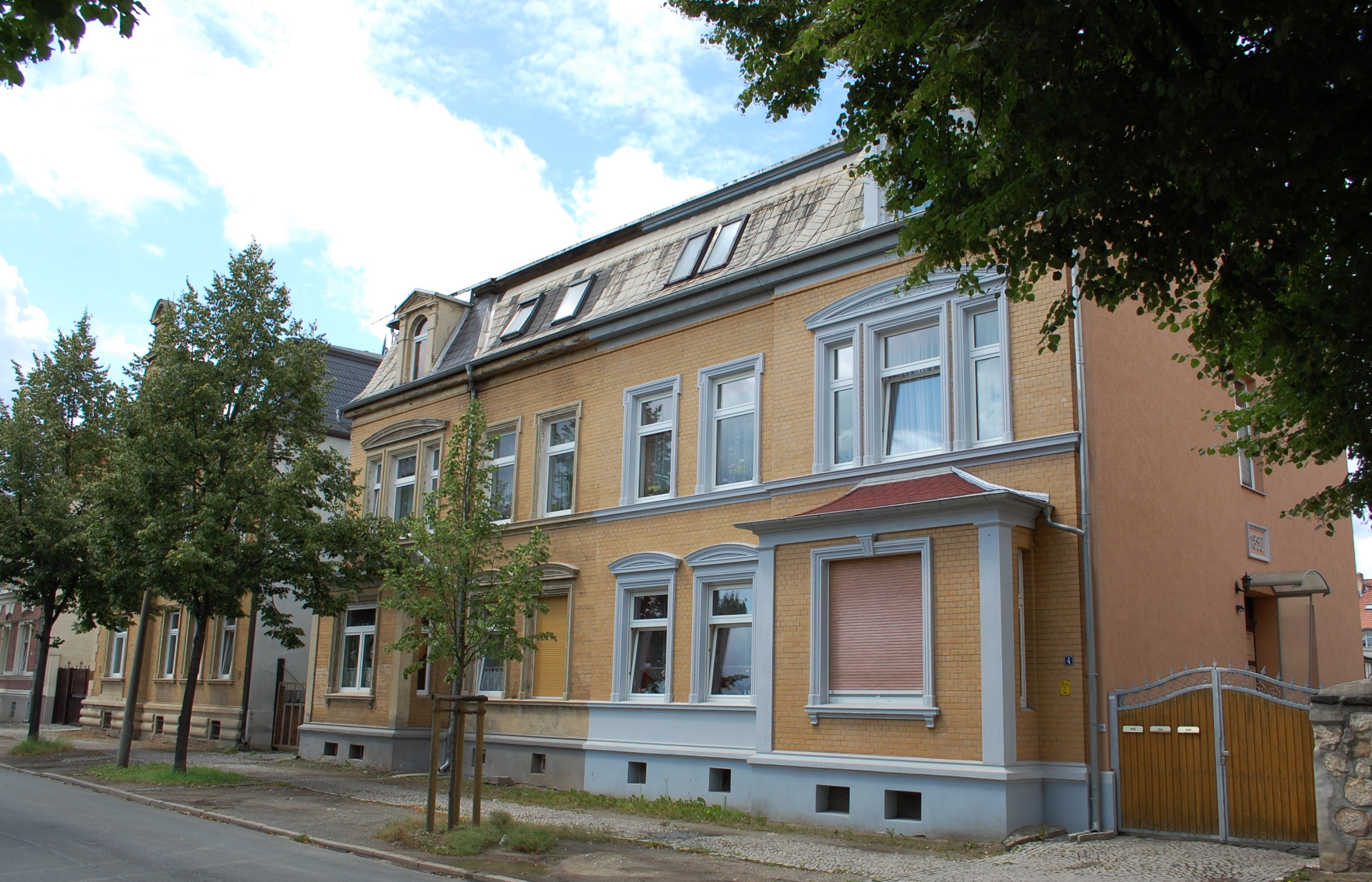 Haus Rambergweg 4-6 in Quedlinburg